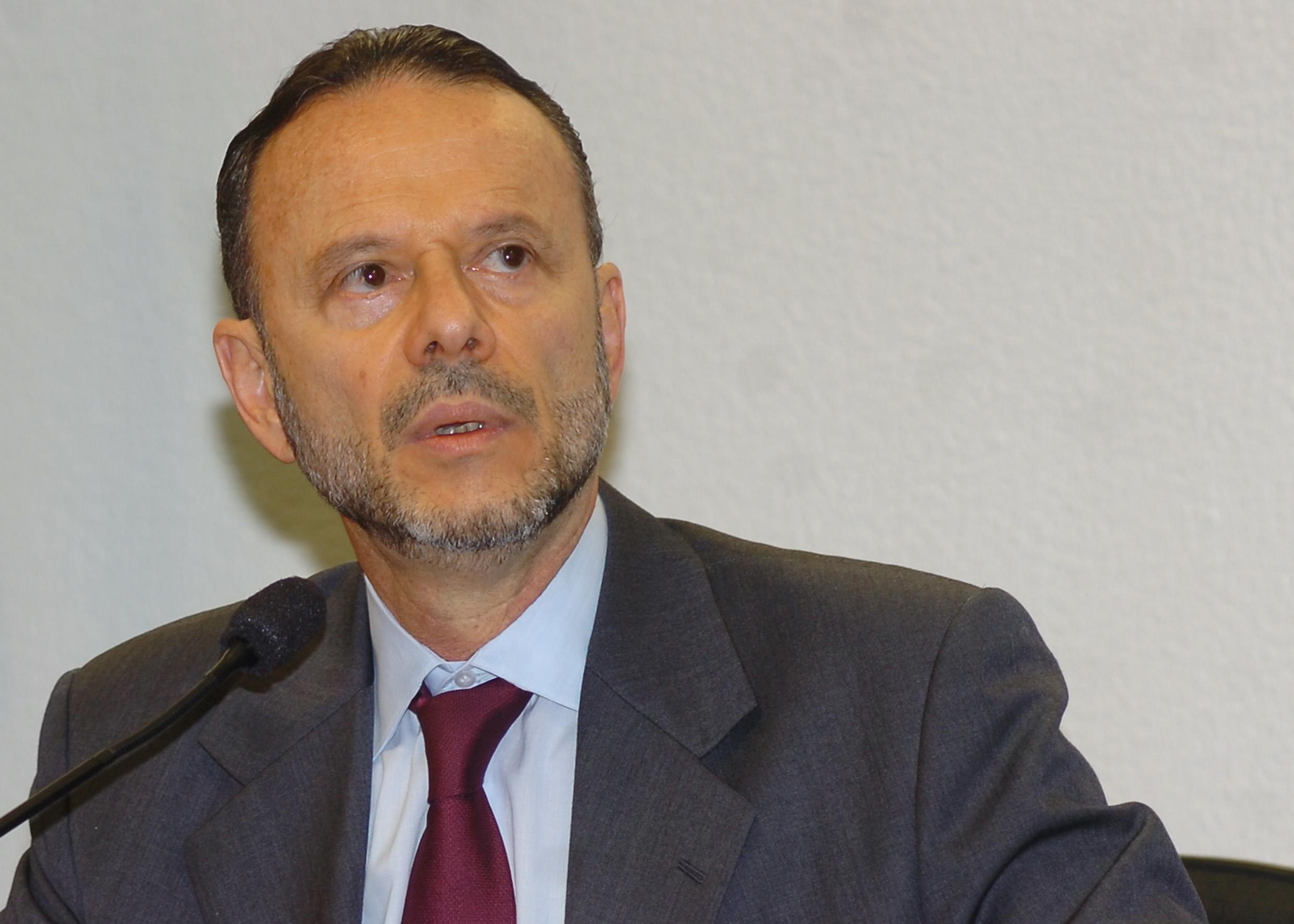 Brasília - O presidente do BNDES, Luciano Coutinho, participa de audiência pública na Comissão de Assuntos Econômicos do Senado sobre o Fundo Soberano Foto: Marcello Casal Jr./Abr